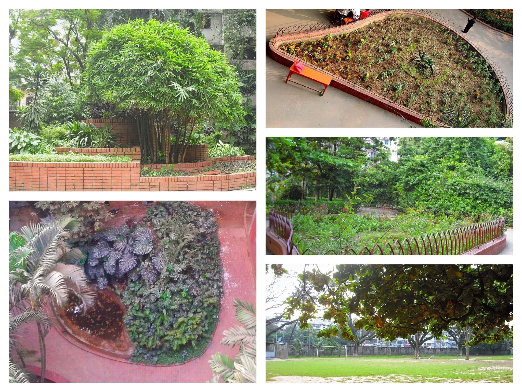 নটর ডেম কলেজের সৌন্দর্য বর্ধক গাছপালা